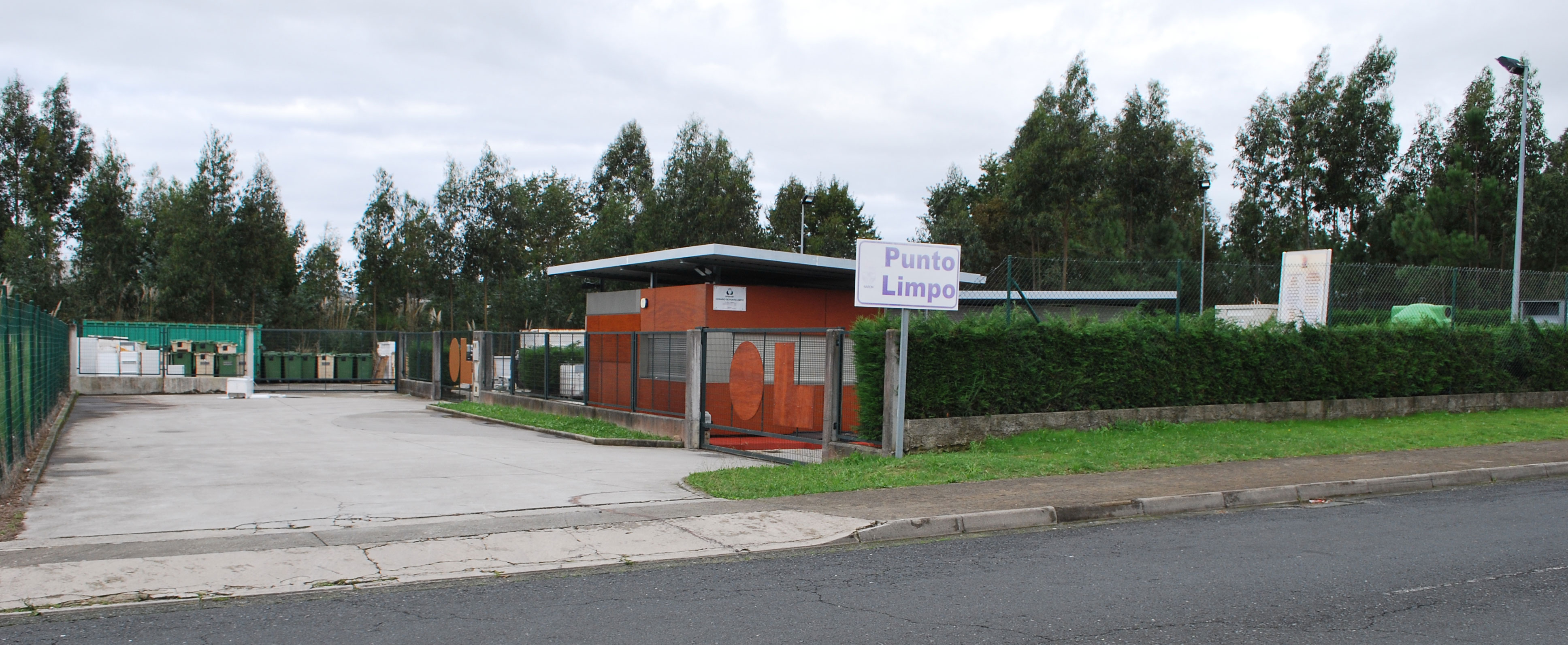 Acceso ao Punto Limpo de Narón en Río do Pozo A Coruña